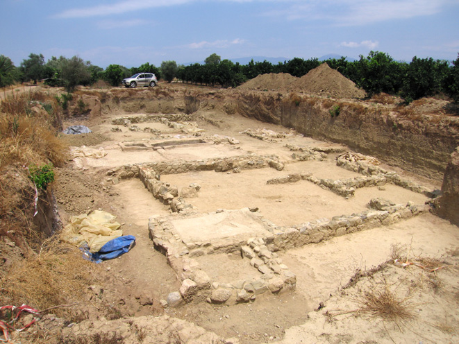 Die Ausgrabungsstätte einer antiken Färberei in Helike